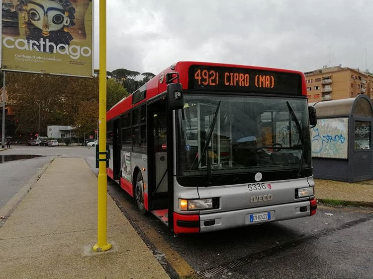 In servizio sul 492